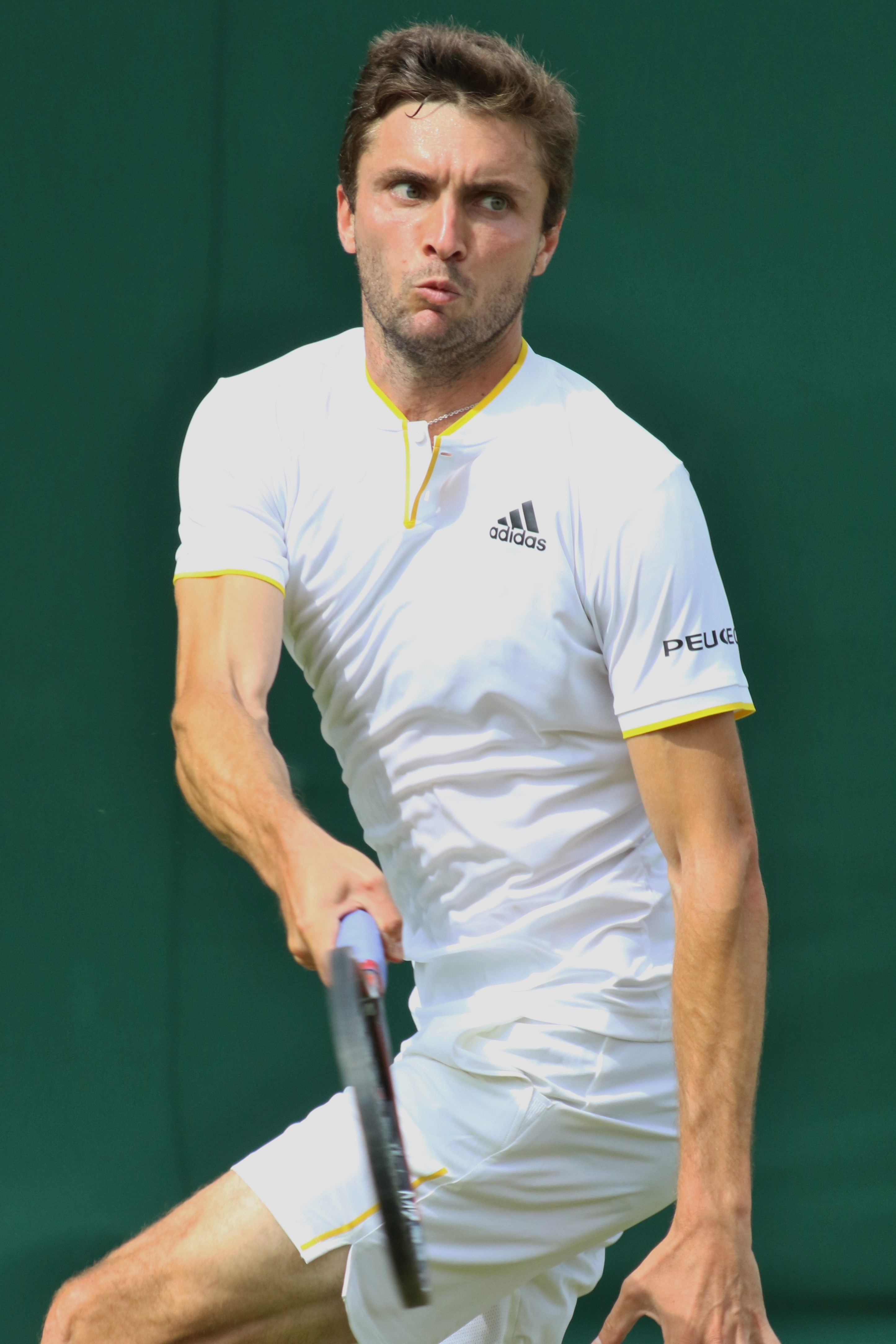 Simon WM17 (9)